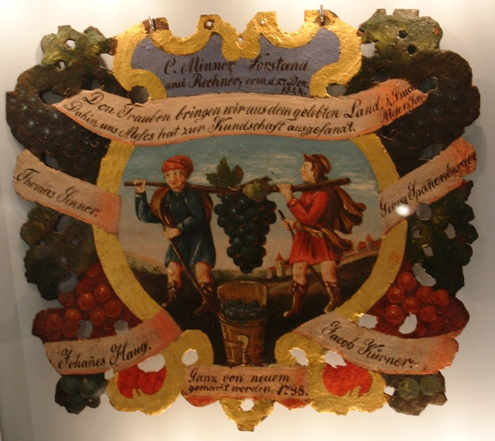 Kalebstraube im Tübinger Stadtmuseum. Dieses bemalte Eisenschild von 1798 entspricht dem sogeannten Stubenzeichen einer Zunft und wurde von den Weingärtnern als solches benutzt. Neben dem biblischen Motiv – der Geschichte von den mit der Riesentraube aus dem gelobten Land zurückkehrenden Kundschaftern Josua und Kaleb – sind die Namen von Zunftmeistern aufgebracht.